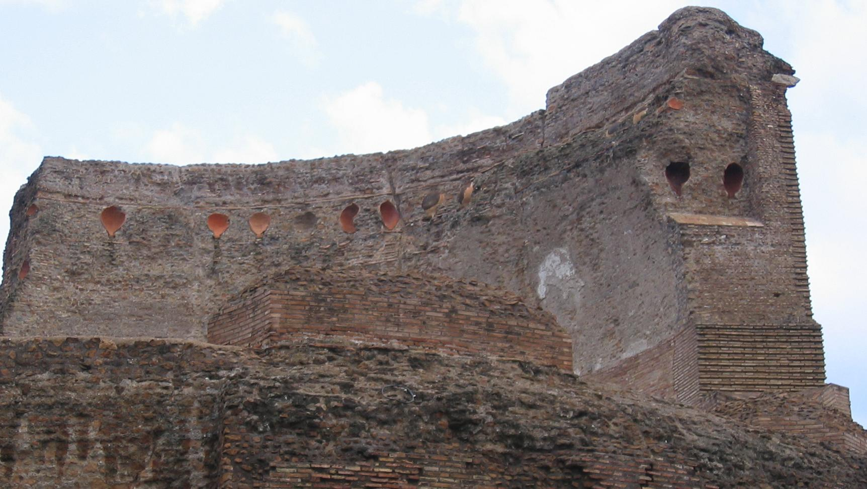 Kuppelansatz des Helenamausoleums in Rom